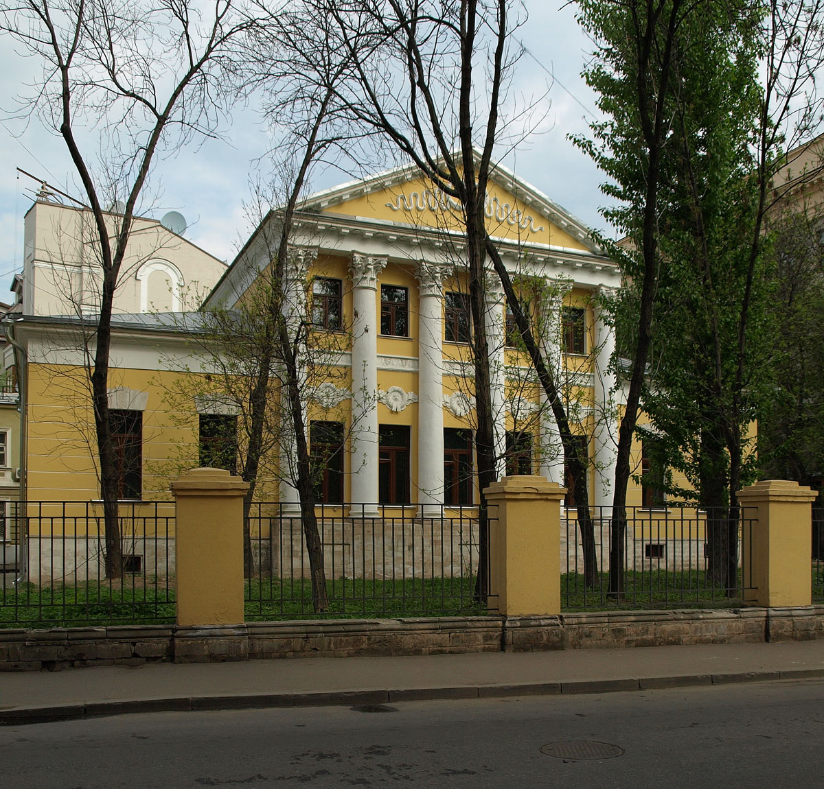 30, Sivtsev Vrazhek Street, Moscow